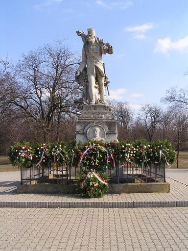 A képet Isaszeg településen található "Honvéd-emlékmű"ről készítettem. -Fgg- A "Rohamozó Honvéd" Radnay Béla alkotása. Talapzatán a domborművek: Görgei Artúr főparancsnok; Klapka György, Aulich Lajos és Damjanich János hadtestparancsnokok arcképei.